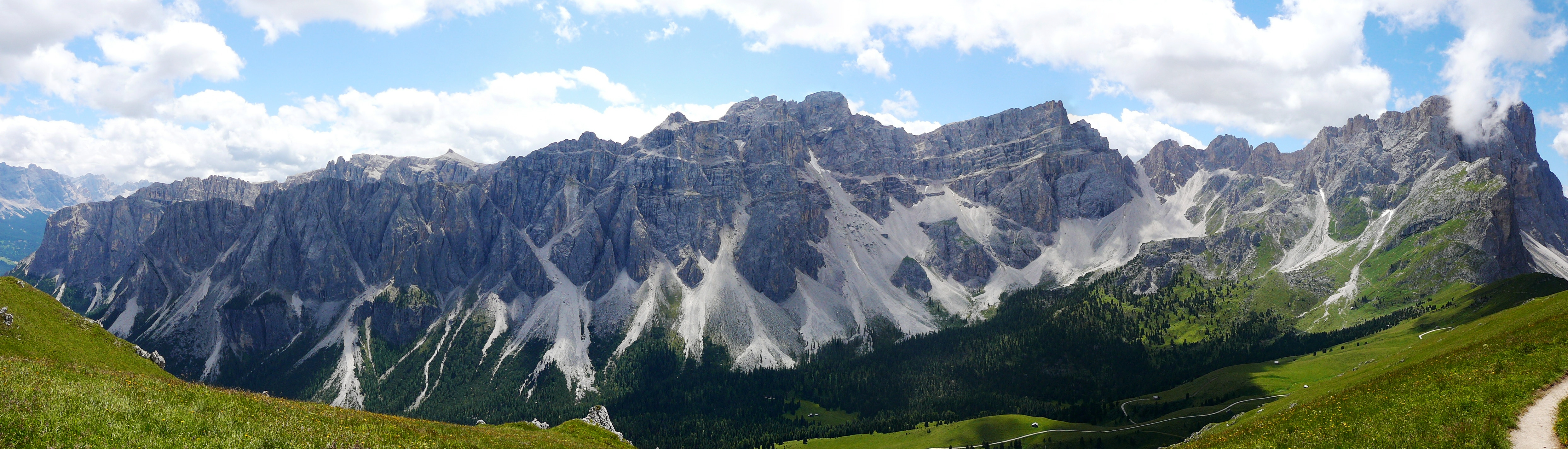 Vista del gruppo del Puez